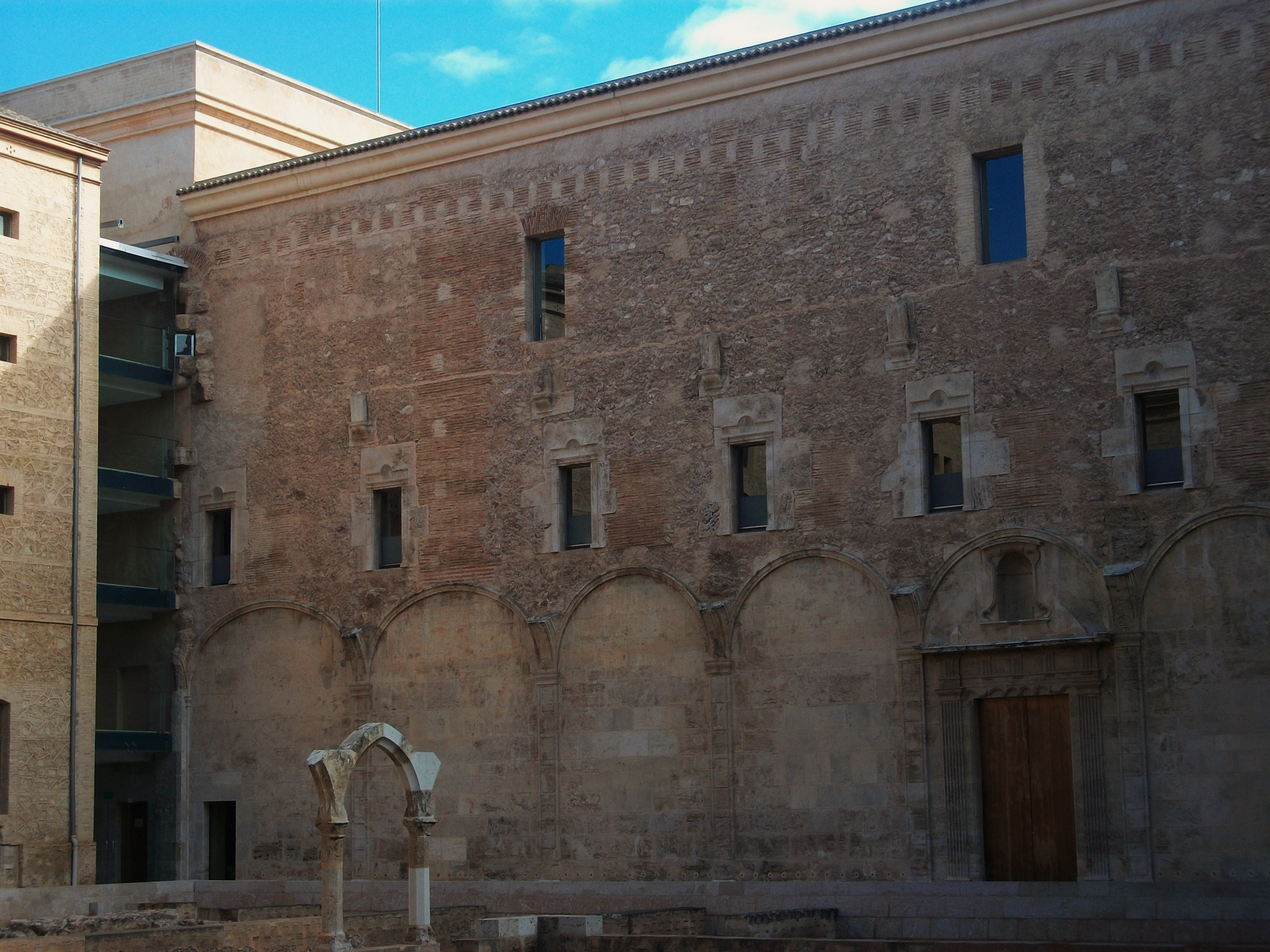 Claustre nord, inacabat, del monestir de sant Miquel dels Reis. S'hi observa un arquet gòtic reconstruït de l'anterior monestir que va ocupar el mateix lloc, Sant Bernat de Rascanya.